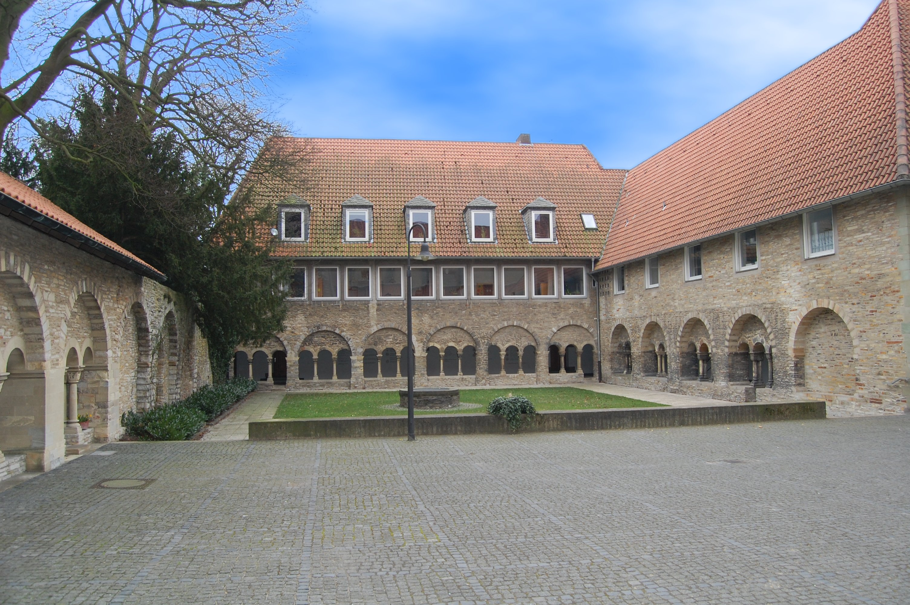 Kreuzgang auf dem 13. Jahrhundert, durch Erweiterung (1. Stock) in den 1970er zum Pfarrheim.Umgebaut